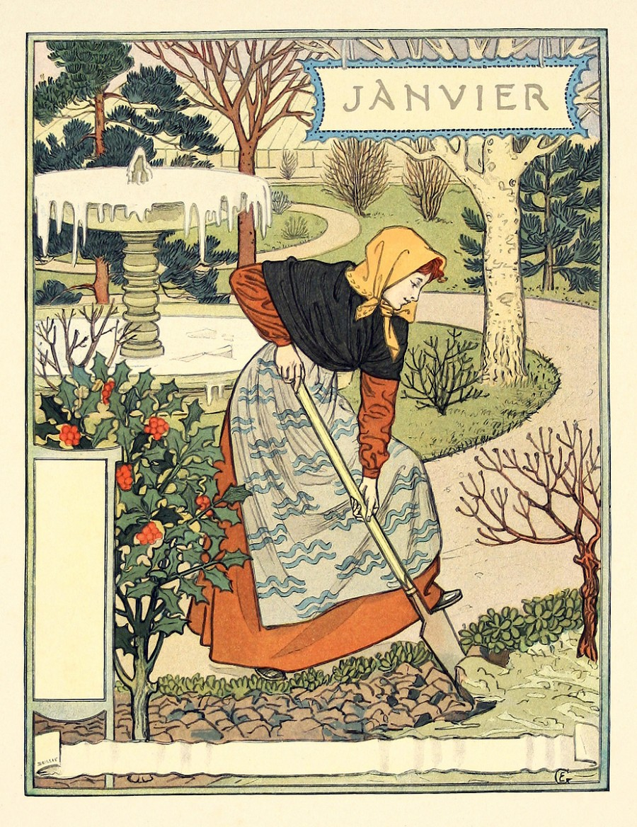 Bild von Eugène Grasset für den Januar